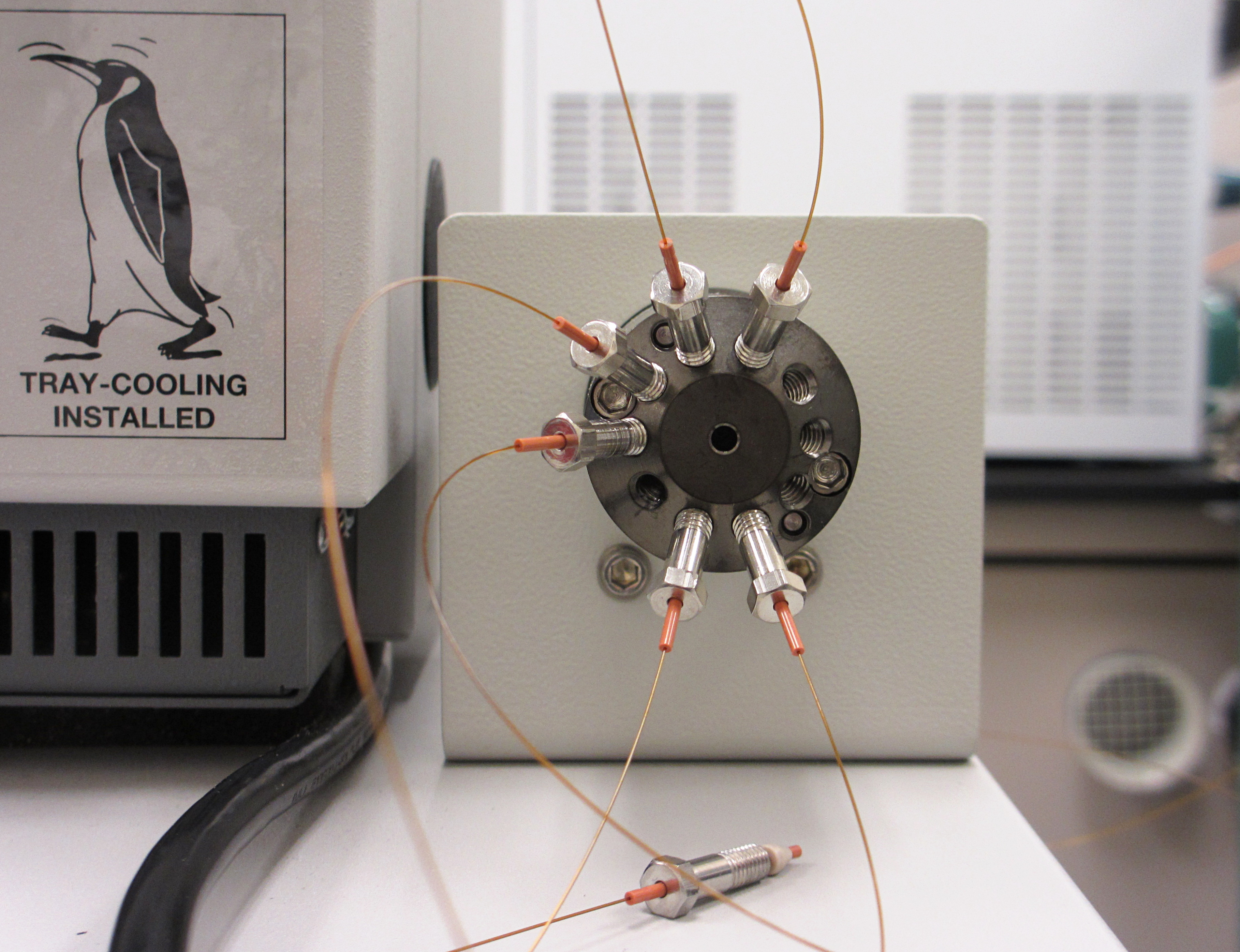 Nano-LC